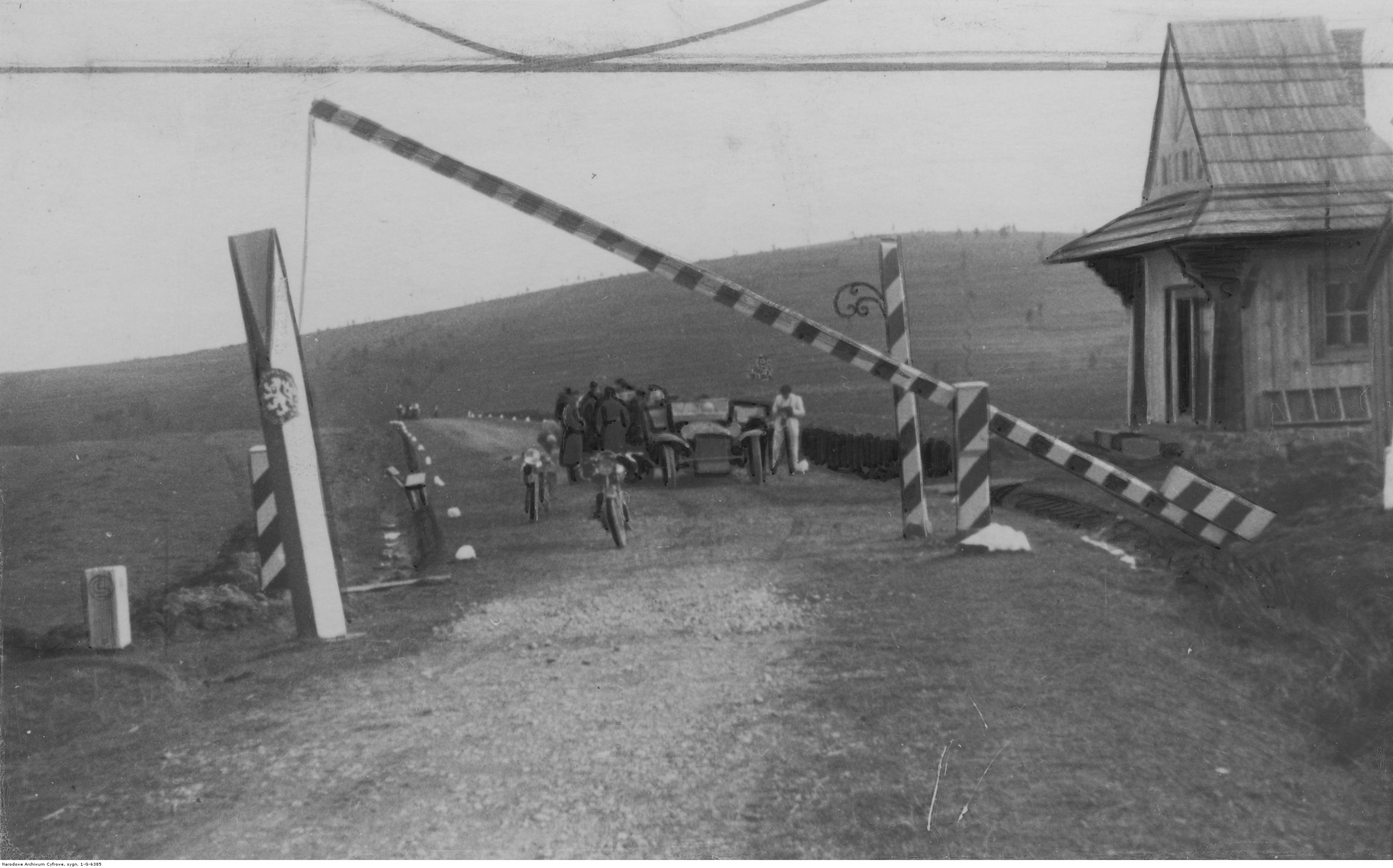 Posterunek Straży Granicznej w Chochołowie (granica z Czechosłowacją); 1934 r. Koncern Ilustrowany Kurier Codzienny - Archiwum Ilustracji. Sygnatura: 1-G-6385